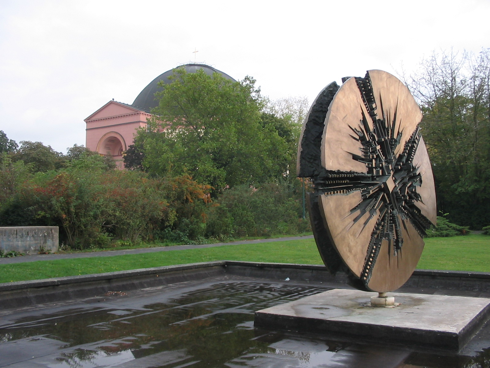 Sculpture Grande Disco (1973) by Arnaldo Pomodoro in Darmstadt/Germany - Mit dieser scheinbar von Star Wars-Todessternen inspirierten Scheibe ehren die Stadt und die Bürger Darmstadts (so die angebrachte Plakette) den Dichter Georg Büchner. Im Hintergrund die Kirche St. Ludwig. geotagged.